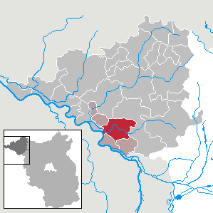 Bad Wilsnack in Brandenburg (Country) - District Prignitz